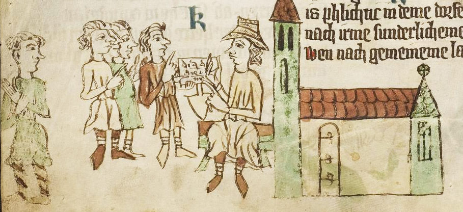 Славянин (слева) показывает с помощью языка жестов, что плохо понимает немецкий язык Источник: Der Sachsenspiegel. Bilder aus der Heidelberger Handschrift. Eberhard Freiherr von Künssberg. Insel Verlag, Leipzig, Insel-Bücherei Nr. [1]